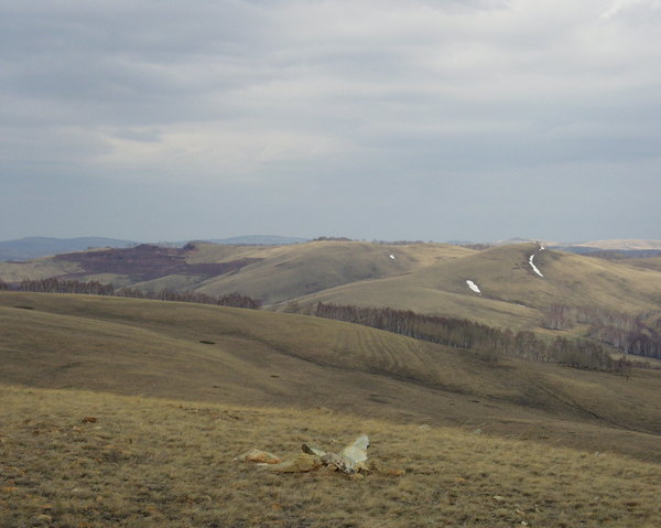 горы Ирендыка